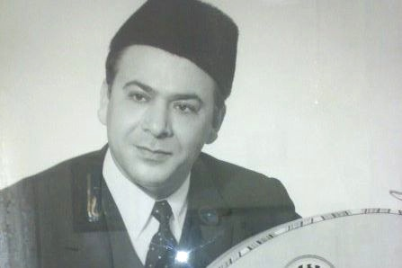 Mohamed Tahar Fergani (1928), chanteur algérien, brillant interprète du malouf et artiste virtuose.